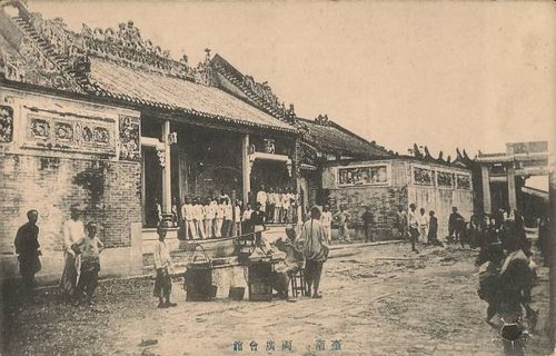 臺南兩廣會館及重道崇文坊